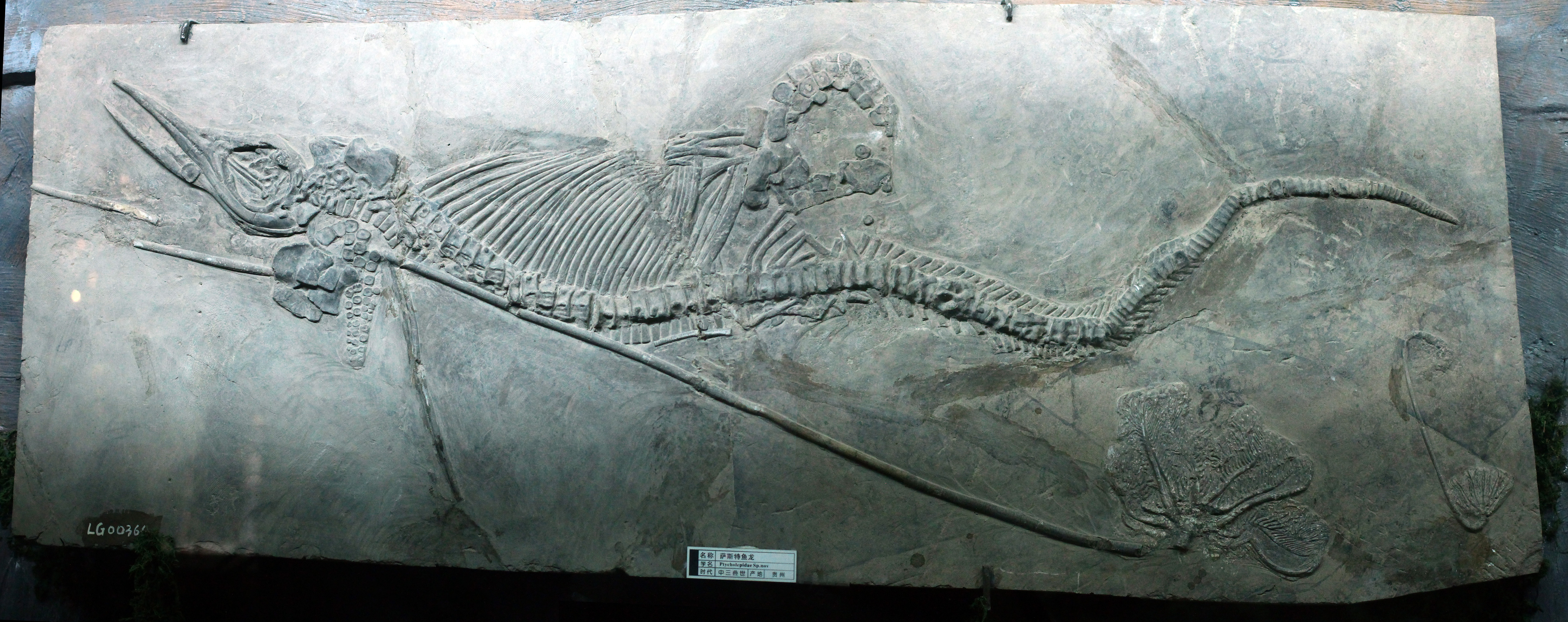 萨斯特鱼龙 Shastasaurus。中三叠世。产地中国贵州。